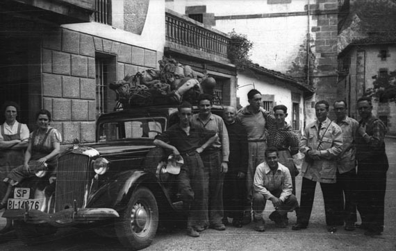 Aranzadiren “II Cursillo de Iniciación a las Ciencias Naturales” (1952ko ekaina), espeleologiari buruzko monografikoa, Troskaetan (Ataun). Eskuinetik hasita: Jesus Elosegi, Carlos Menaia, Noel Llopis, X, X, X, Juan Arin, Felix Ruiz de Arkaute, X, X eta X.